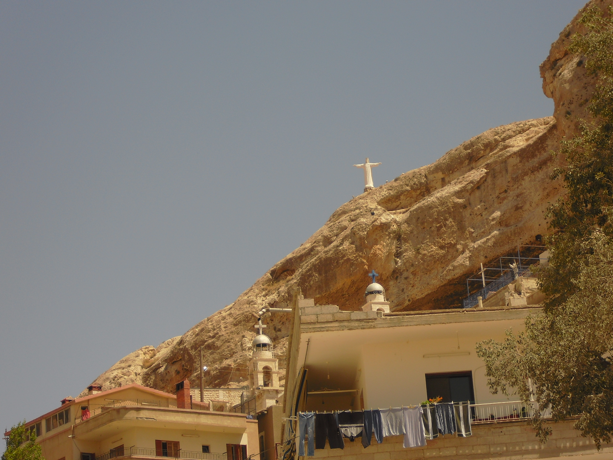 Maaloula Syria معلولا سوريا